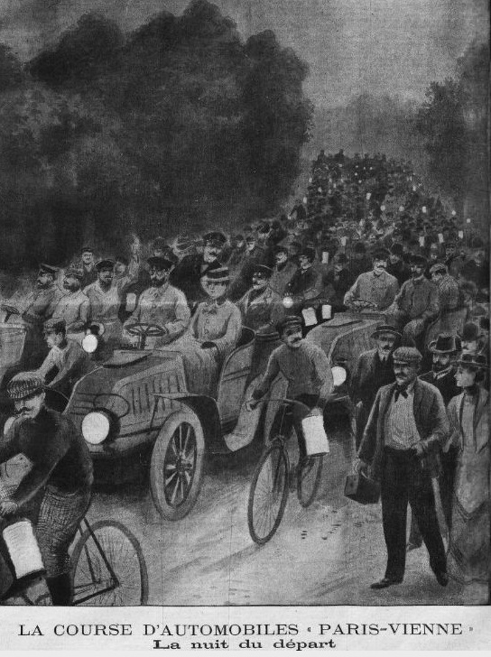 Paris-Vienne 1902 - La nuit du départ - Supplément du Petit Journal, 13 juillet 1902, n°608, p.221